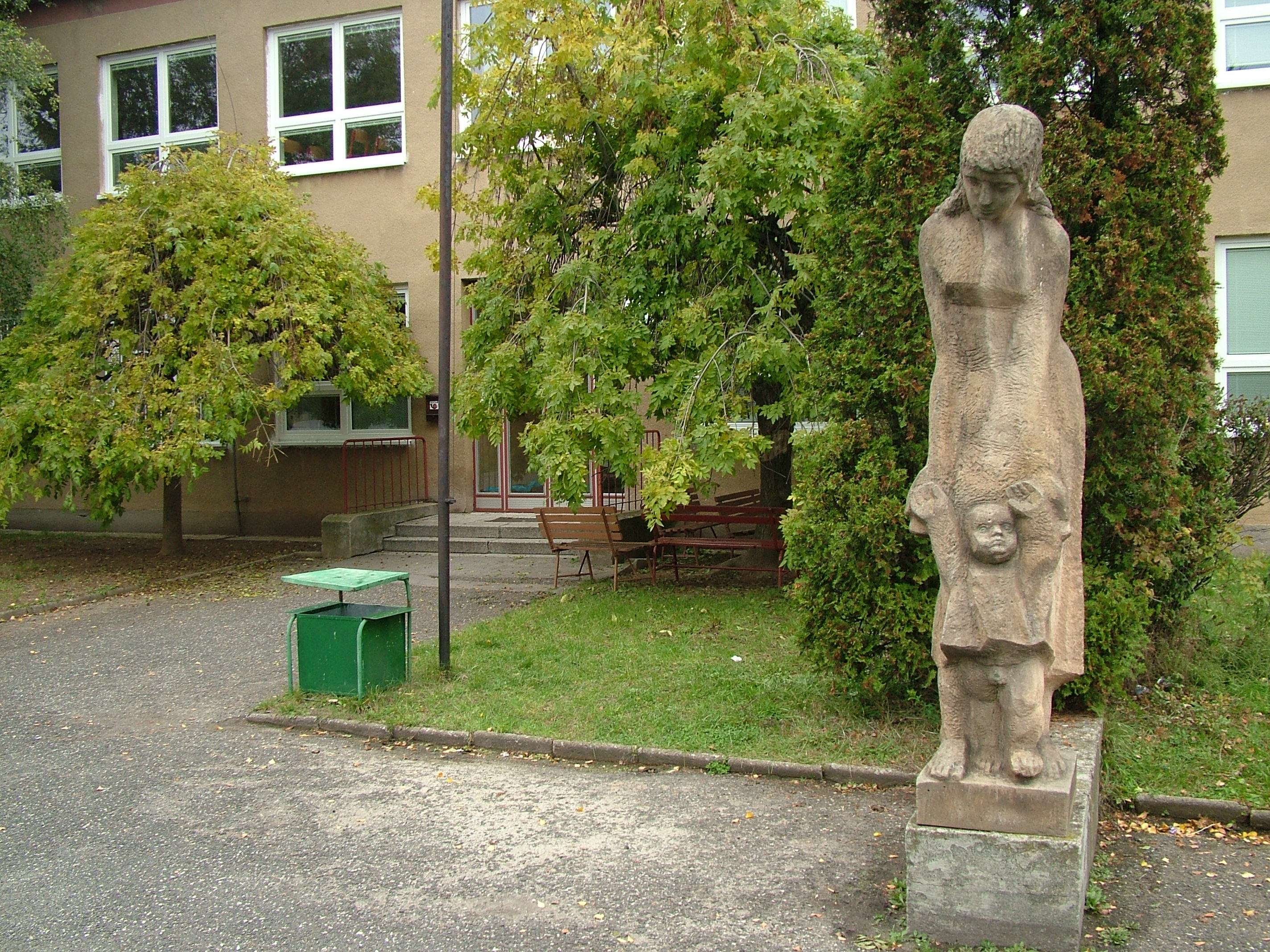 Základní škola Jesenice u Rakovníka, socha ženy s dítětem